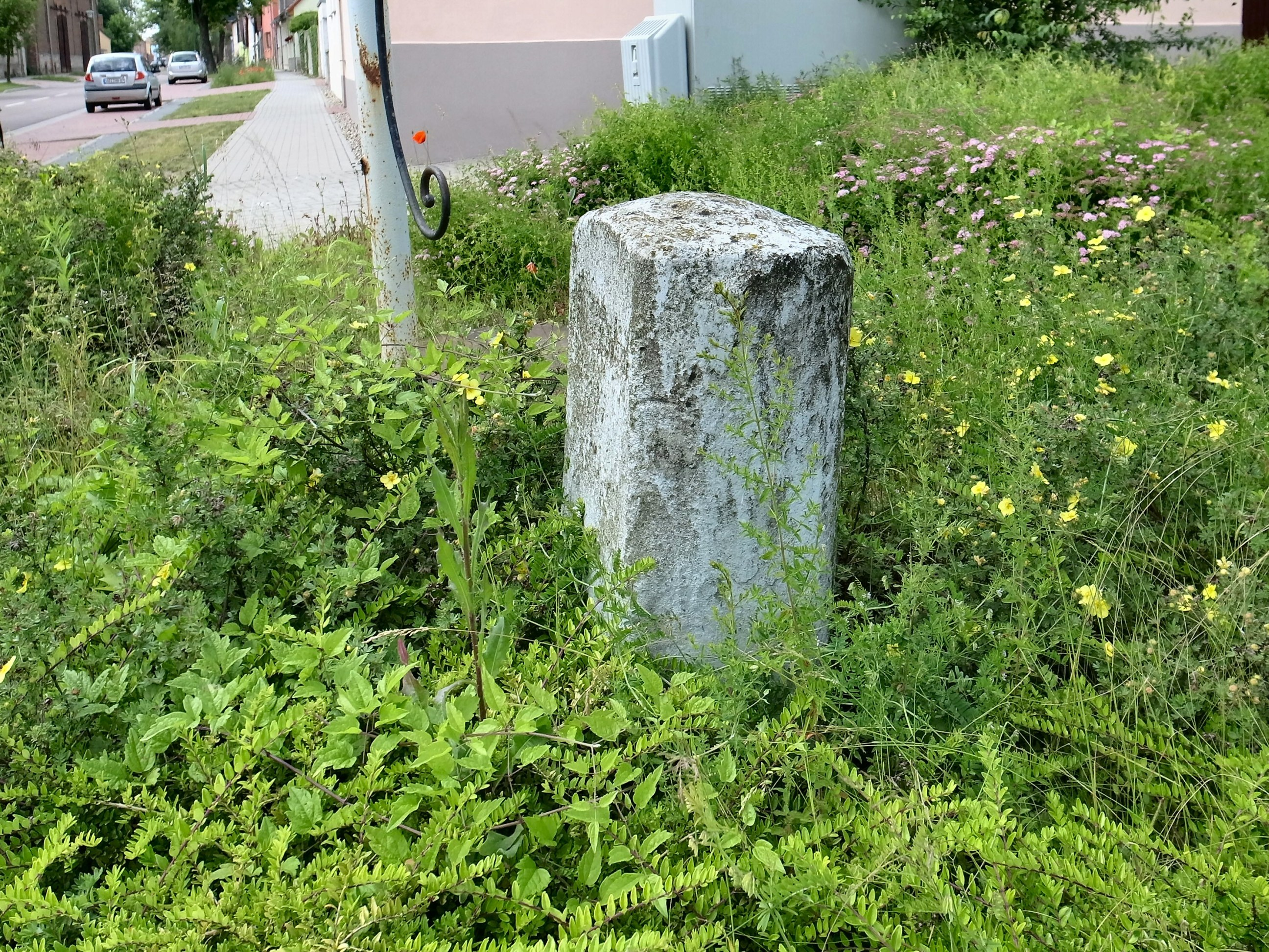 Kleinpaschleben, Anhaltischer Meilenstein.